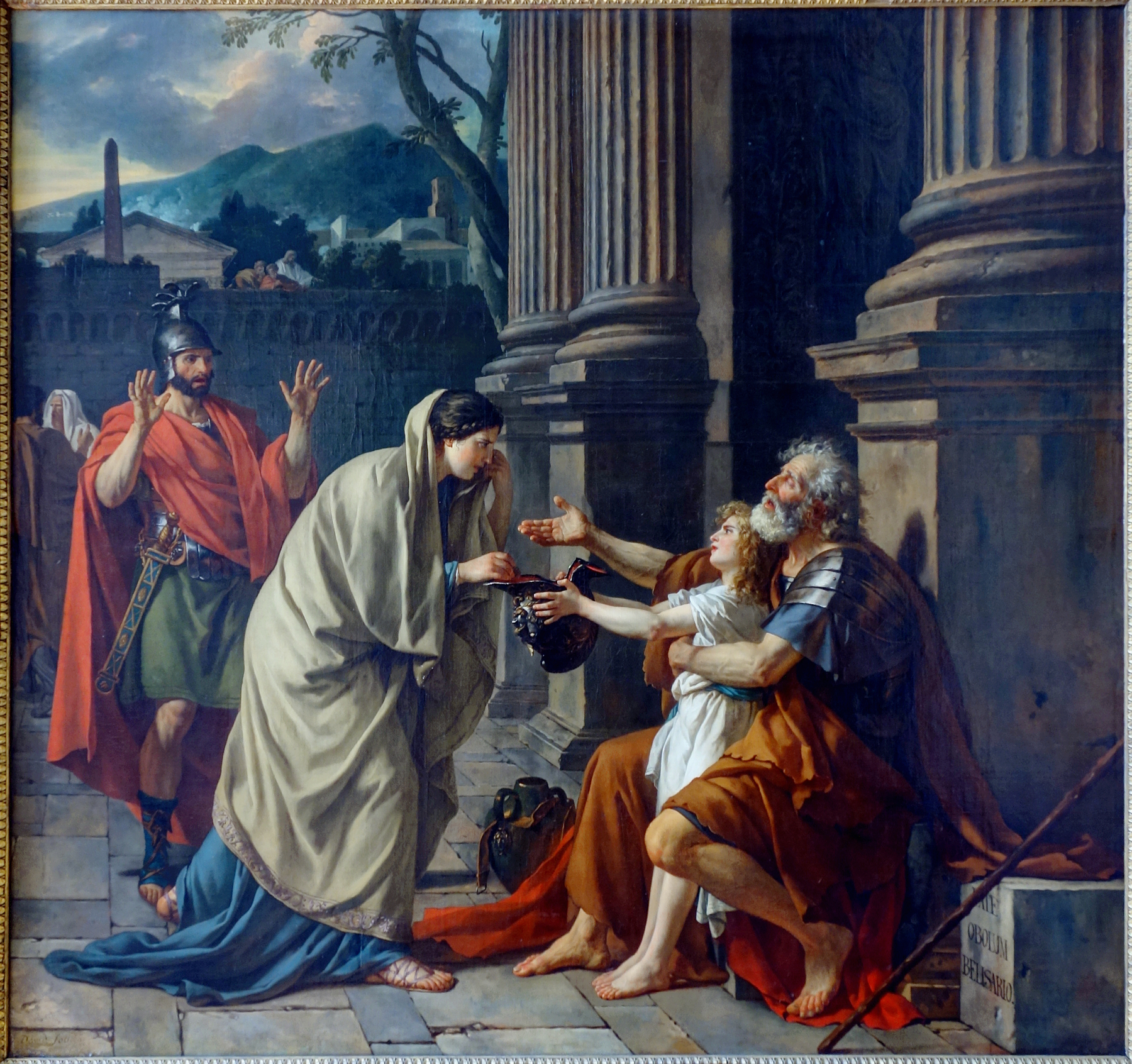 Bélisaire demandant l'aumône.Belisarius asking for Almstitle QS:P1476,fr:"Bélisaire demandant l'aumône." label QS:Lfr,"Bélisaire demandant l'aumône." label QS:Len,"Belisarius asking for Alms"